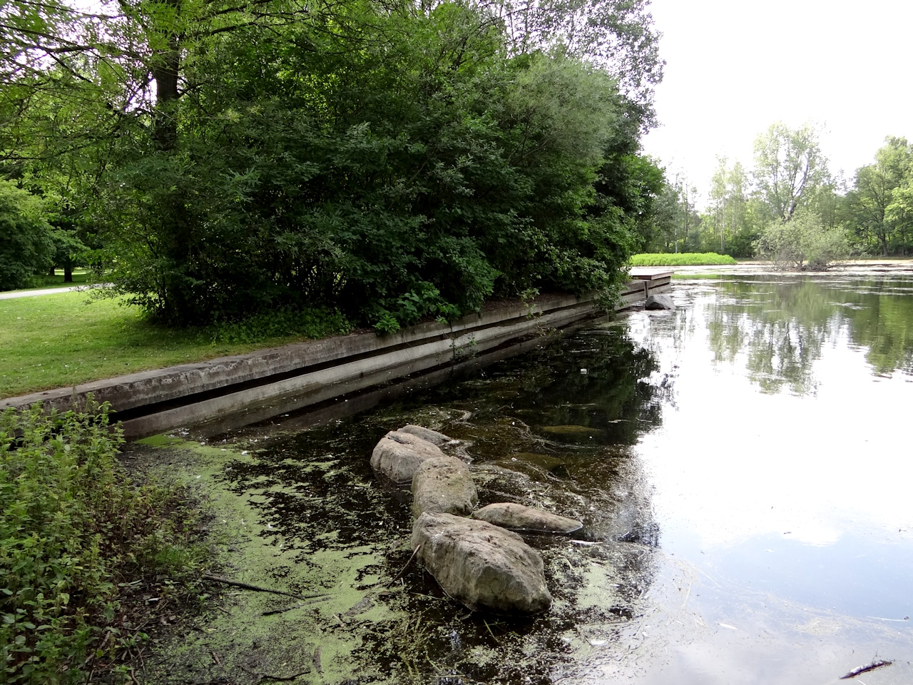 Lünischteich vom Südostufer, befestigter Rand des ehemaligen Schwimmbads unterhalb der früheren Tribüne.